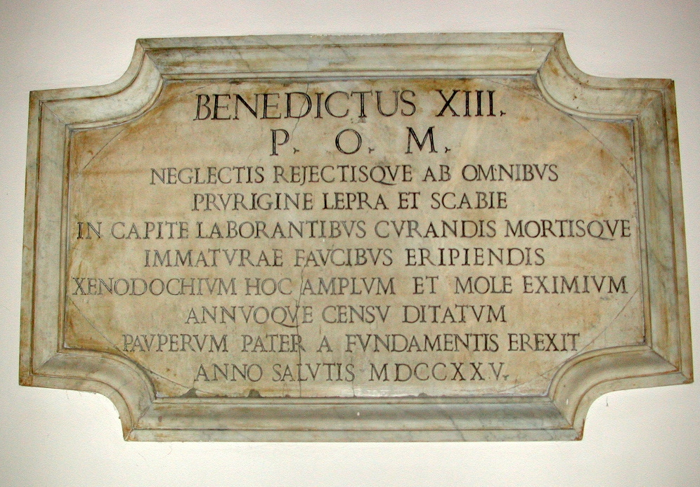 Roma, Lapide Commemorativa della fondazione dell'Ospedale di S. Maria e S. Gallicano